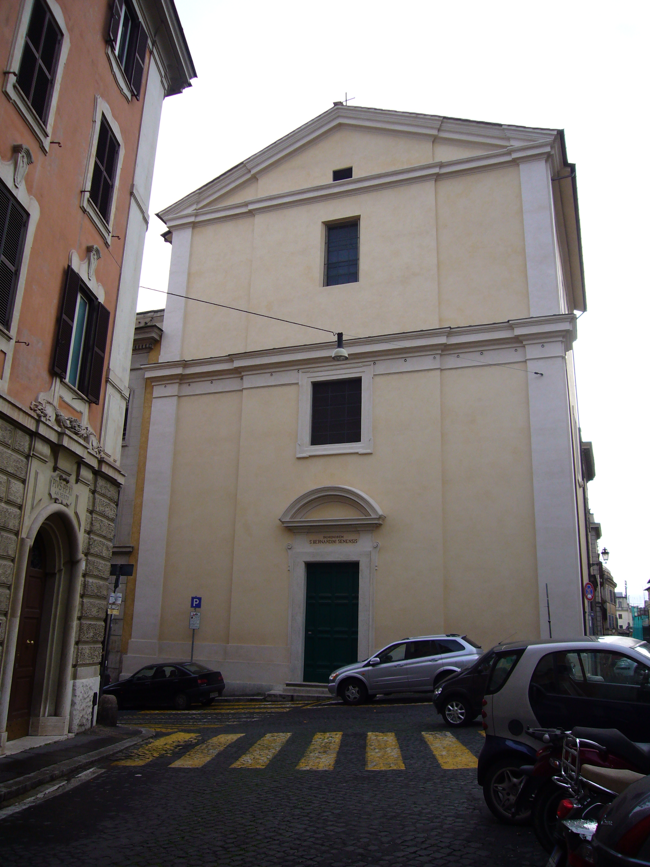 Roma, san Bernardino a Panisperna